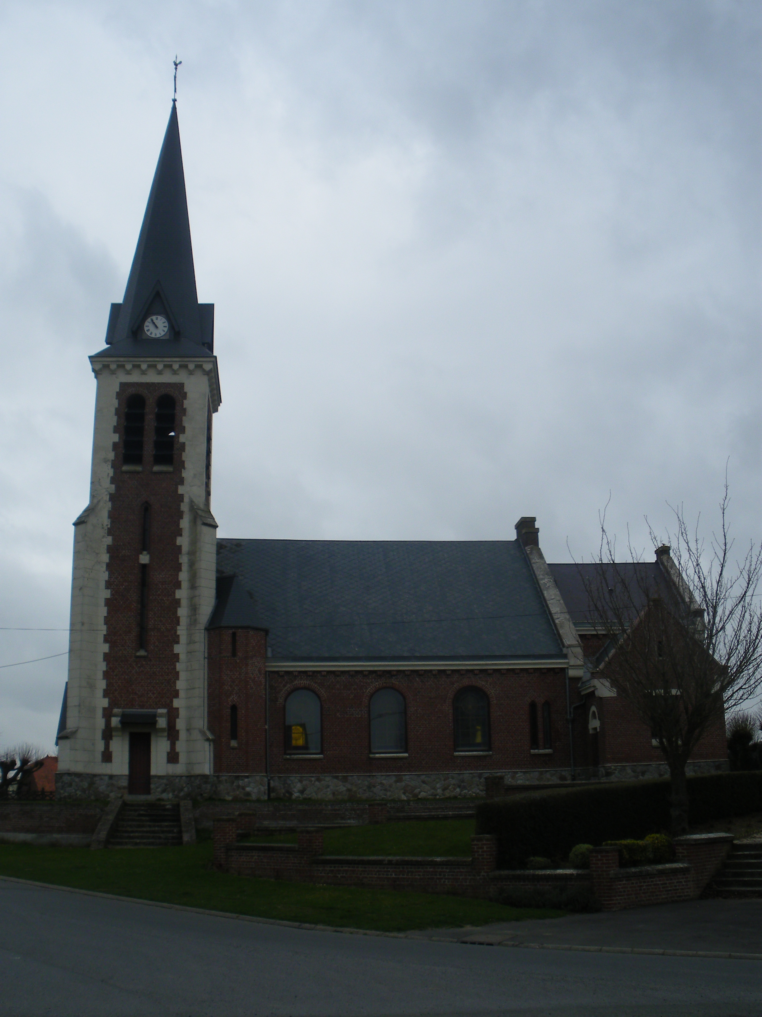 Vue de l'église Saint-Martin de Barastre.